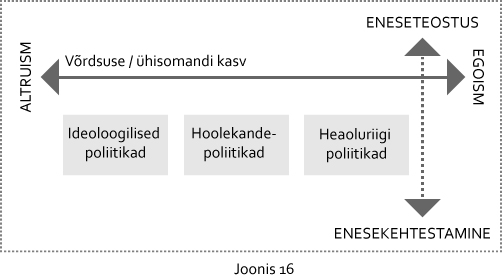 Võrdsuse teljele on paigutatud võrdsustamiseks rakendatavad poliitikad